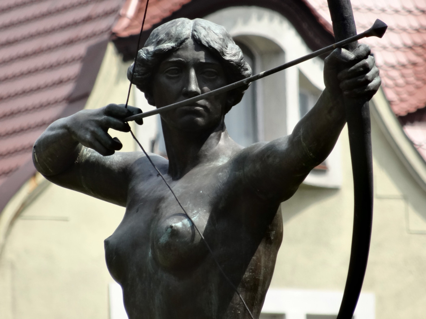 Rzeźba Łuczniczki autorstwa prof. Ferdinanda Lepcke odsłonięta w 1910 r. w Bydgoszczy